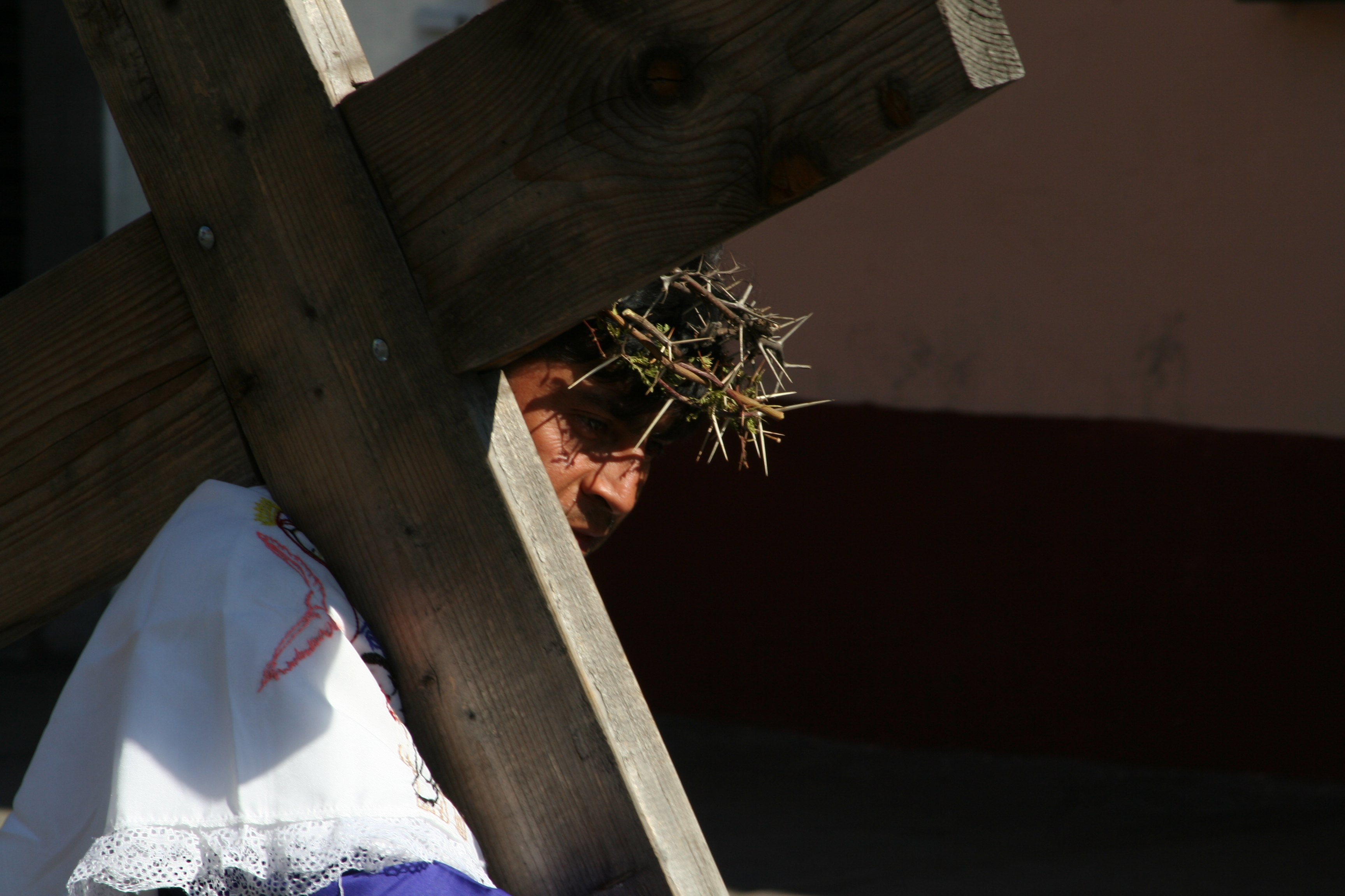 ein Büßer während des Via Crucis in Iztapalapa, Mexiko Stadt